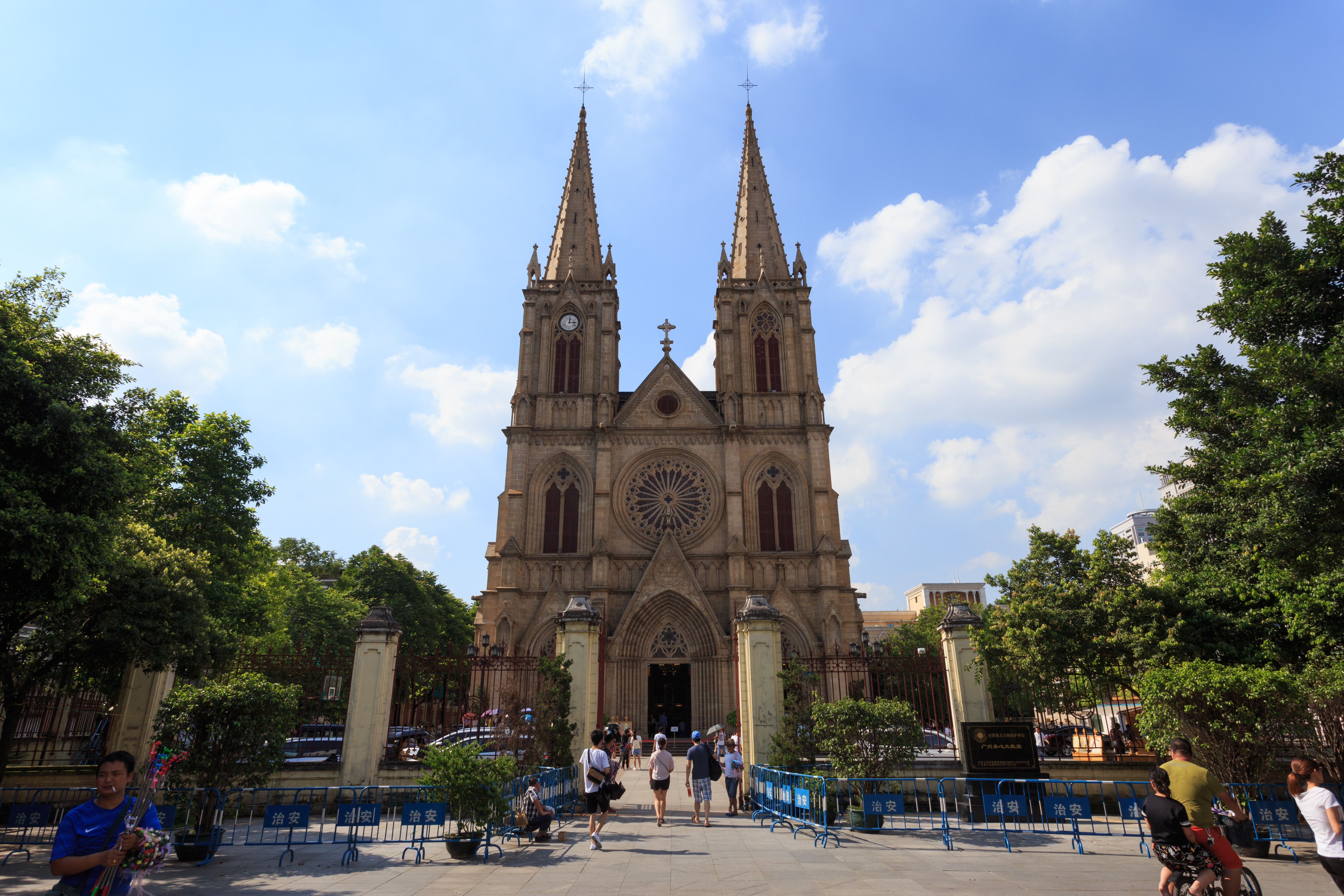 广州石室圣心大教堂